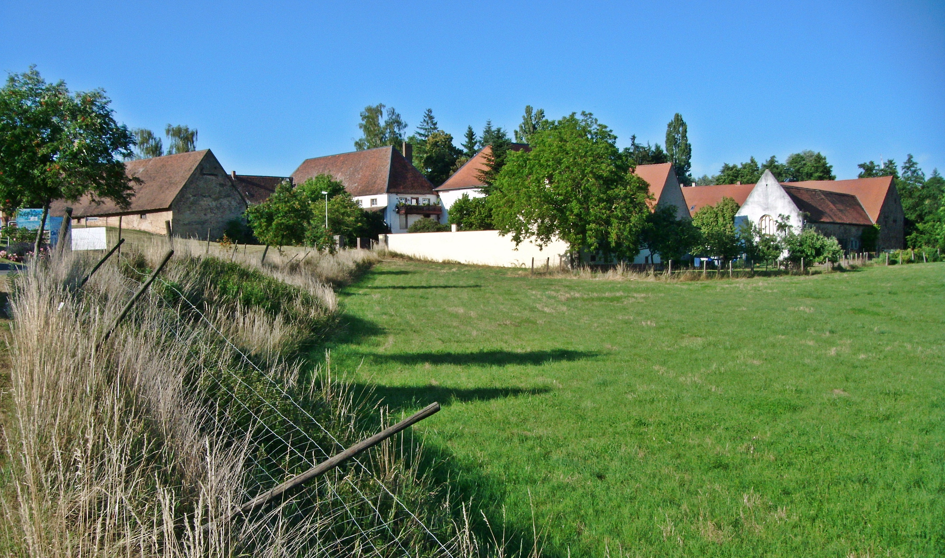 Kloster Hane, Bolanden, Rheinland-Pfalz